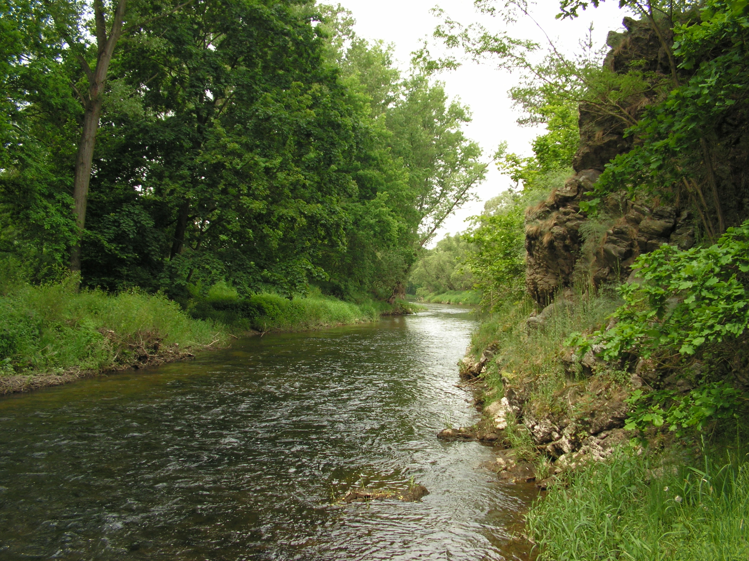 Řeka Želivka u ústí do Sázavy. Řeka v pozadí je již Sázava.